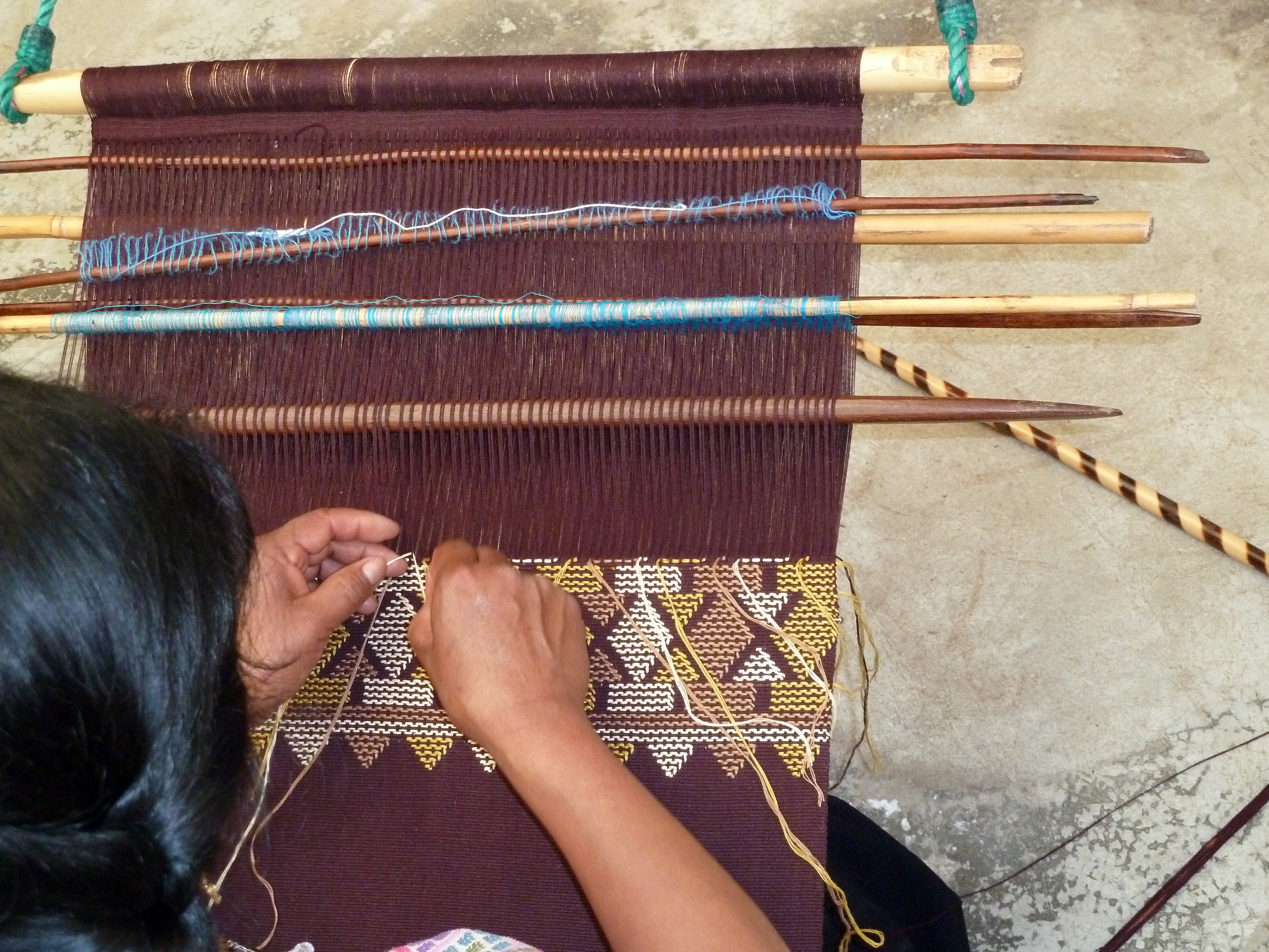 Day 7: San Juan Chamula